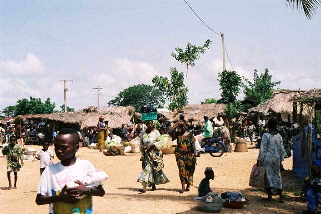 Markt von Grand-Popo, Benin.